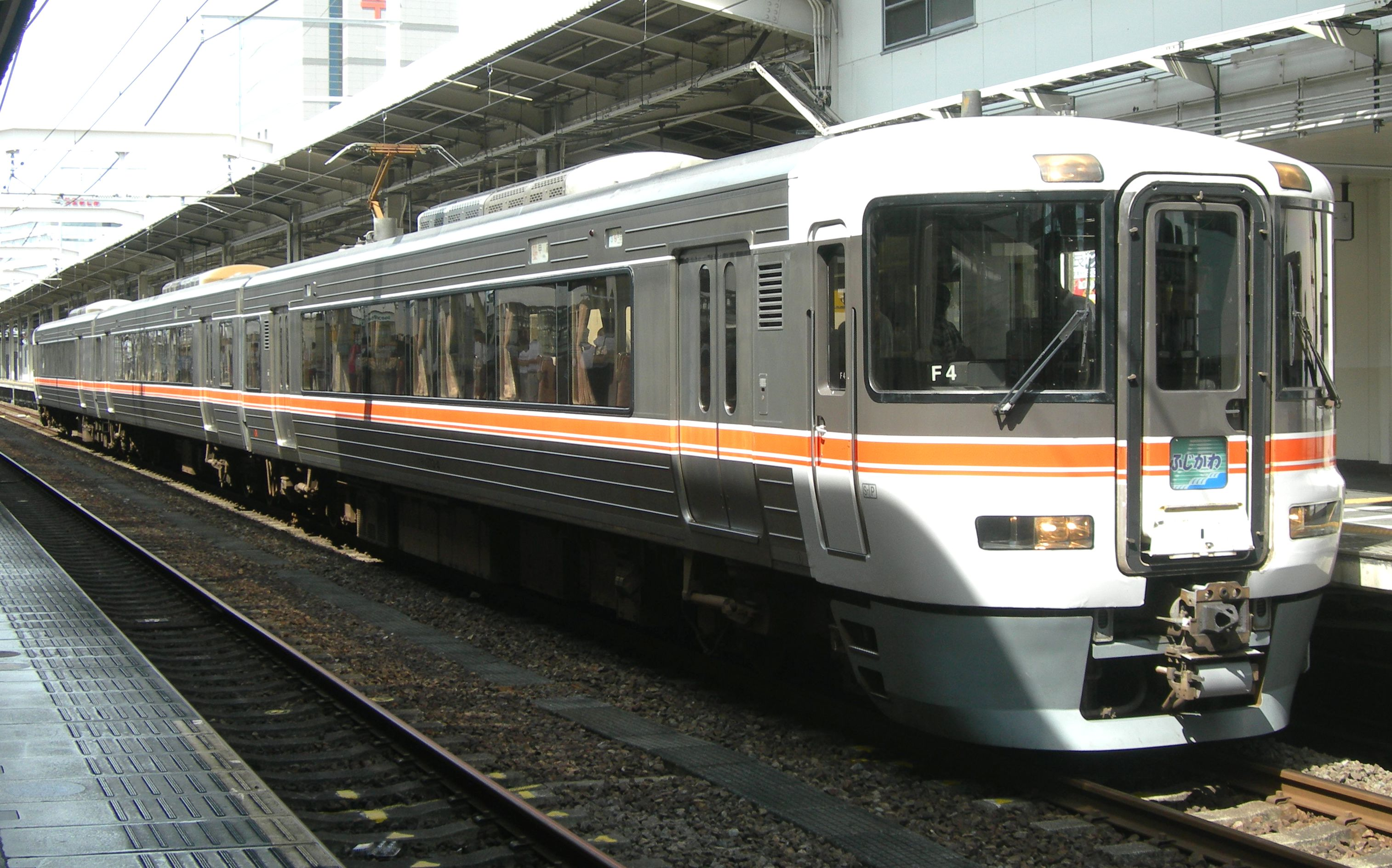 東海旅客鉄道373系